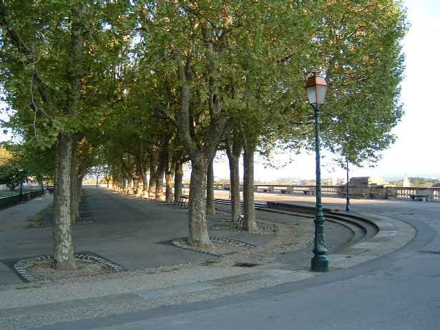 Montpellier : Peyrou. Photo personnelle.